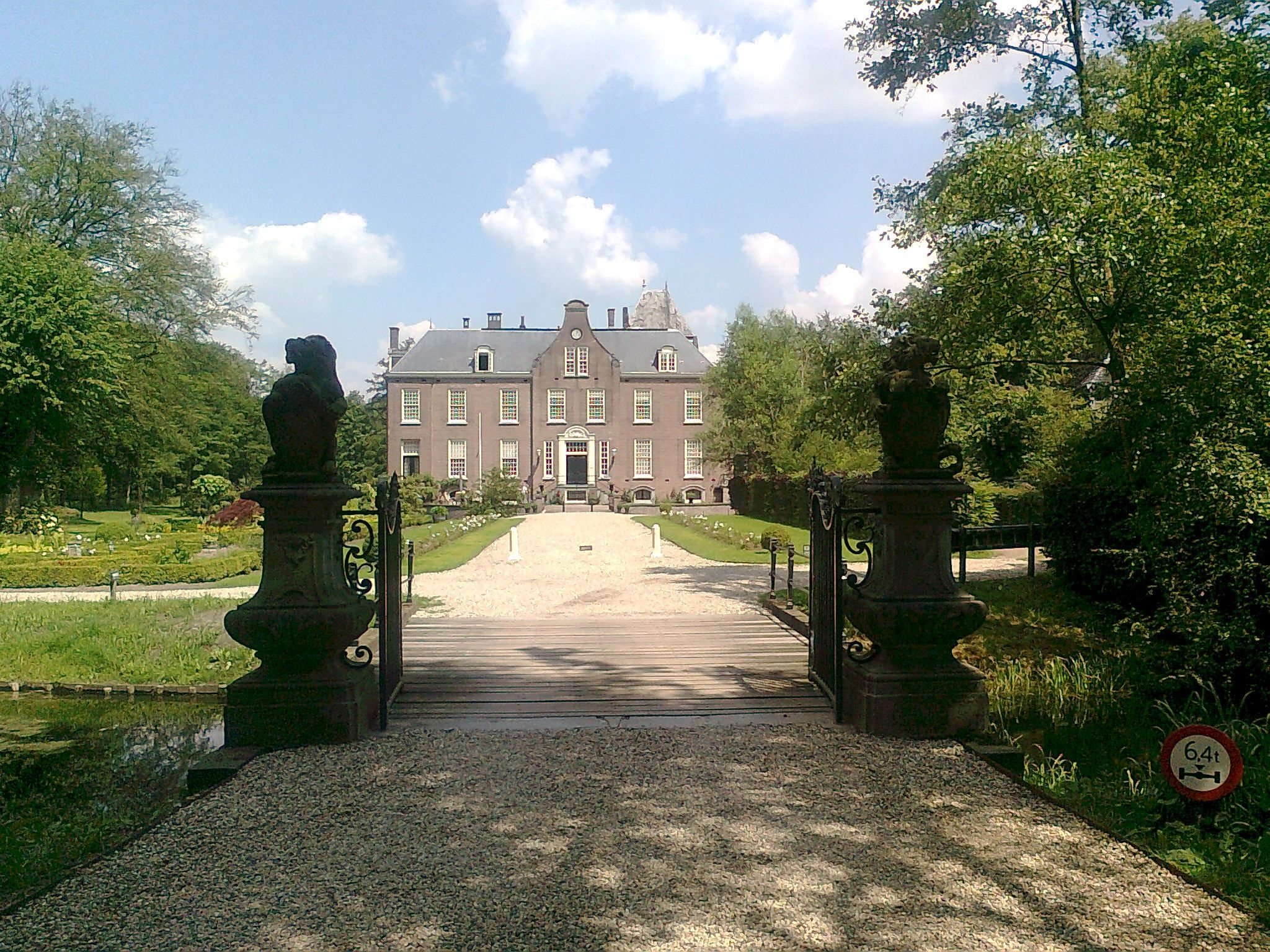 Kasteel Groot Hoenlo te Olst